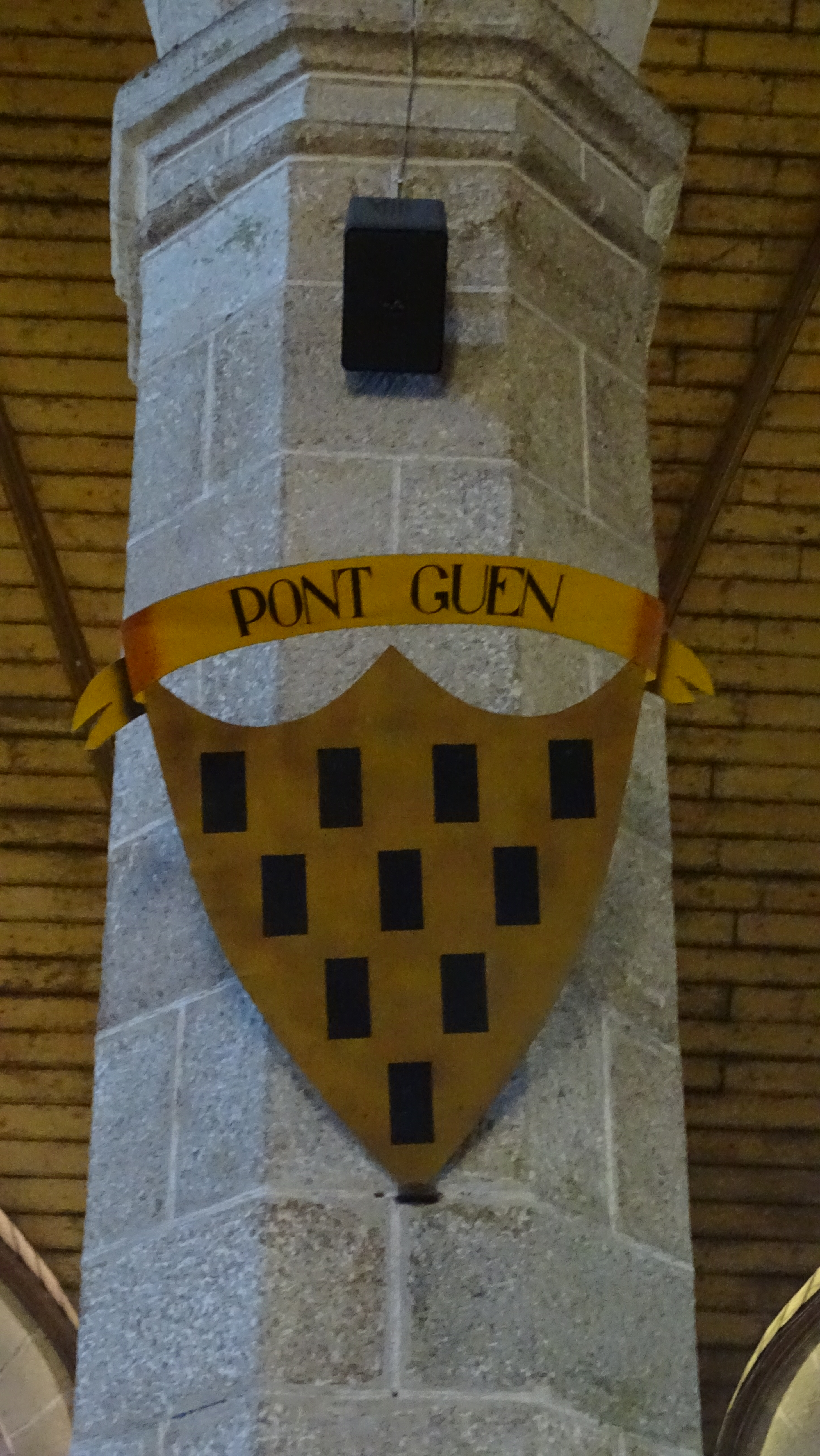 En iliz Plouared